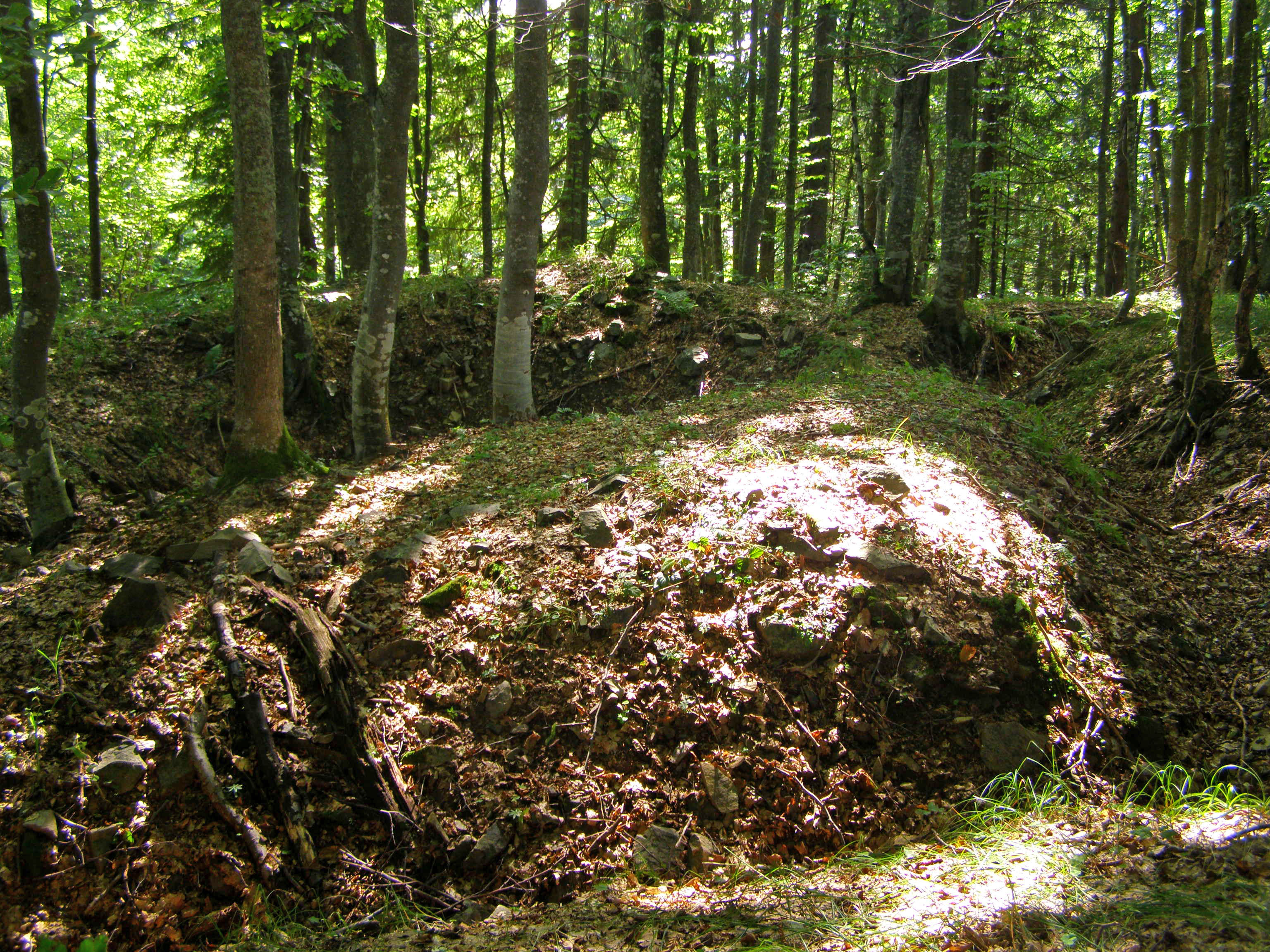 Svydovec, zákopy z první světové války v úbočí horského masivu